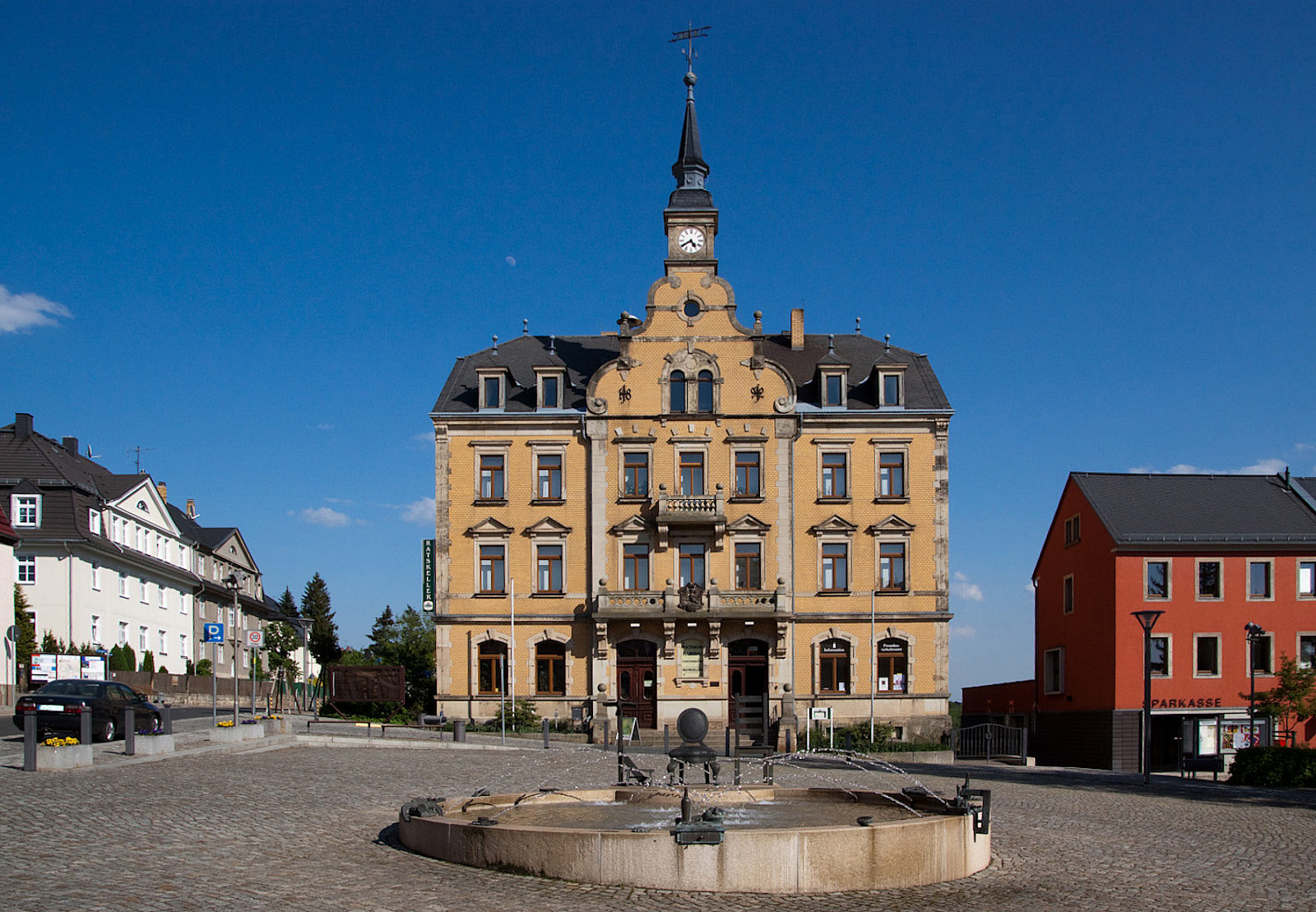 Rabenau (Sachsen), Rathaus mit Stuhlbau-Brunnen